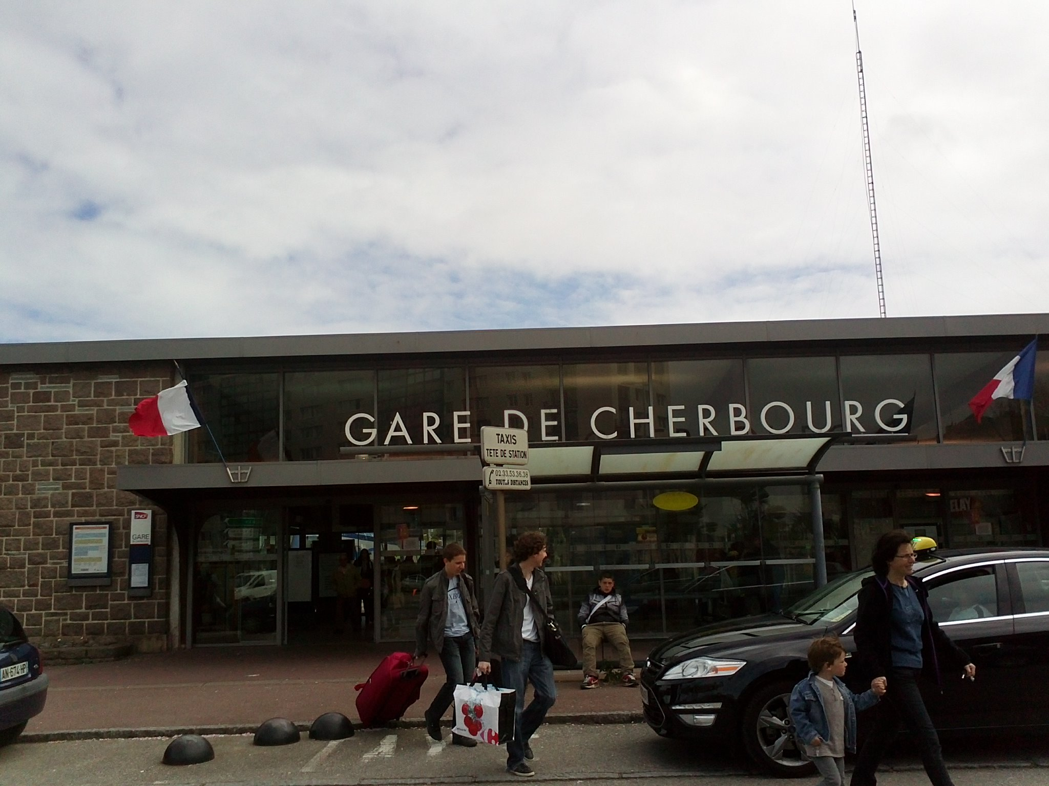 Gare de Cherbourg-2013